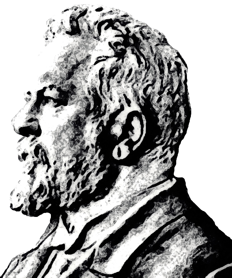 Geheimrat Prof. Dr. Ferdinand August Schmidt (Bonn), Fotografik